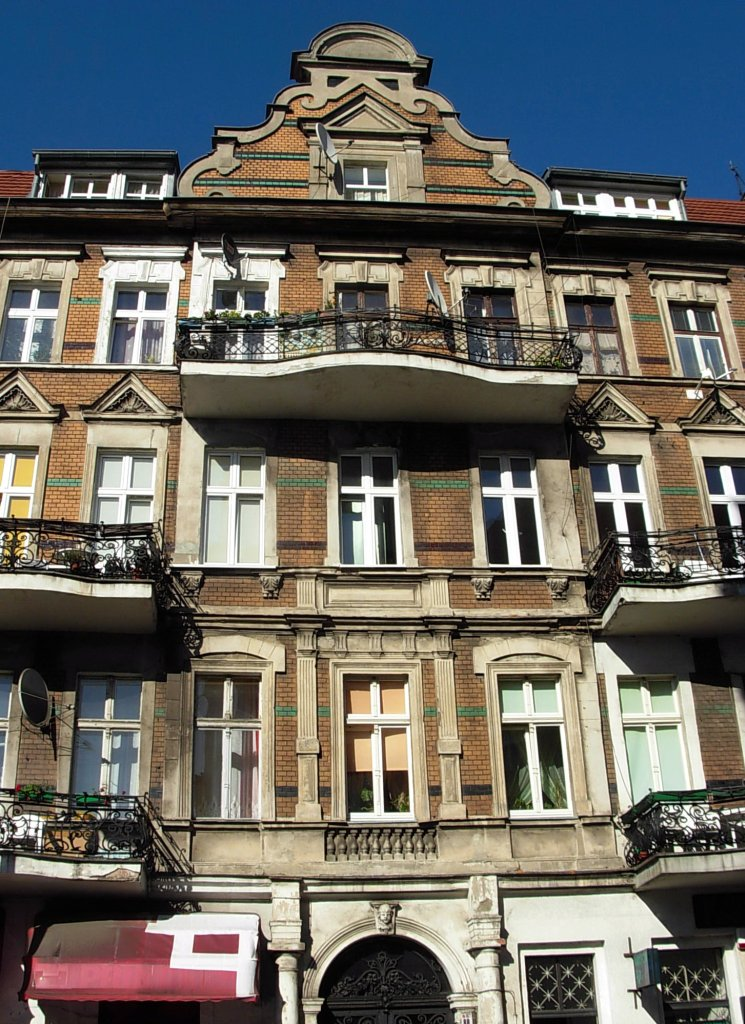 Kamienica ul. Dworcowa 88 w Bydgoszczy